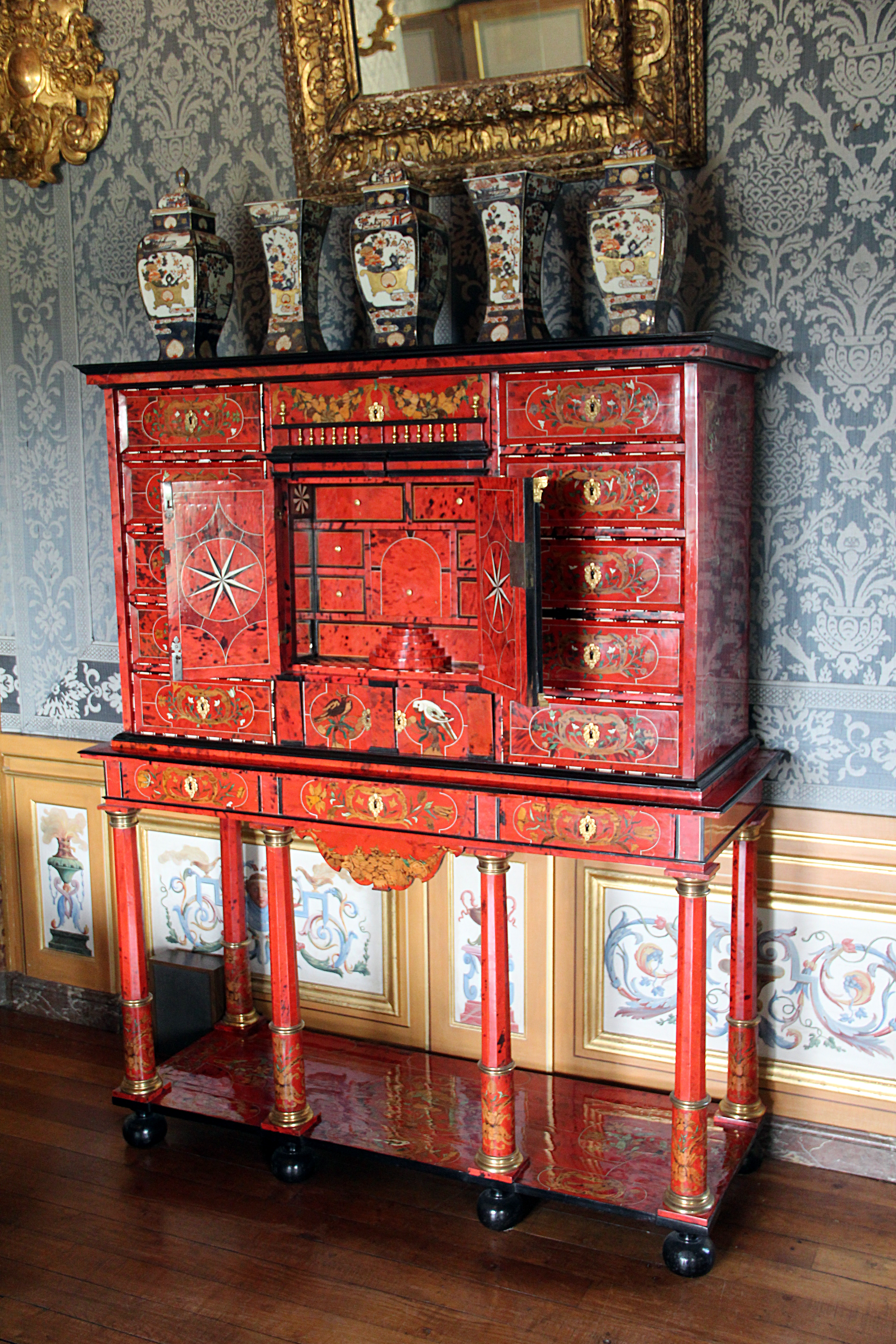 Cabinet d'écaille rouge attribué à Pierre Gole (1620-1684), faisant partie du mobilier du cabinet de madame Fouquet au château de Vaux-le-Vicomte - Maincy (Seine-et-Marne, France).